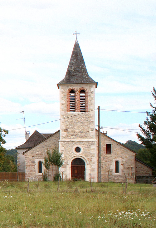 Eglise Saint Martin de Girac (46)